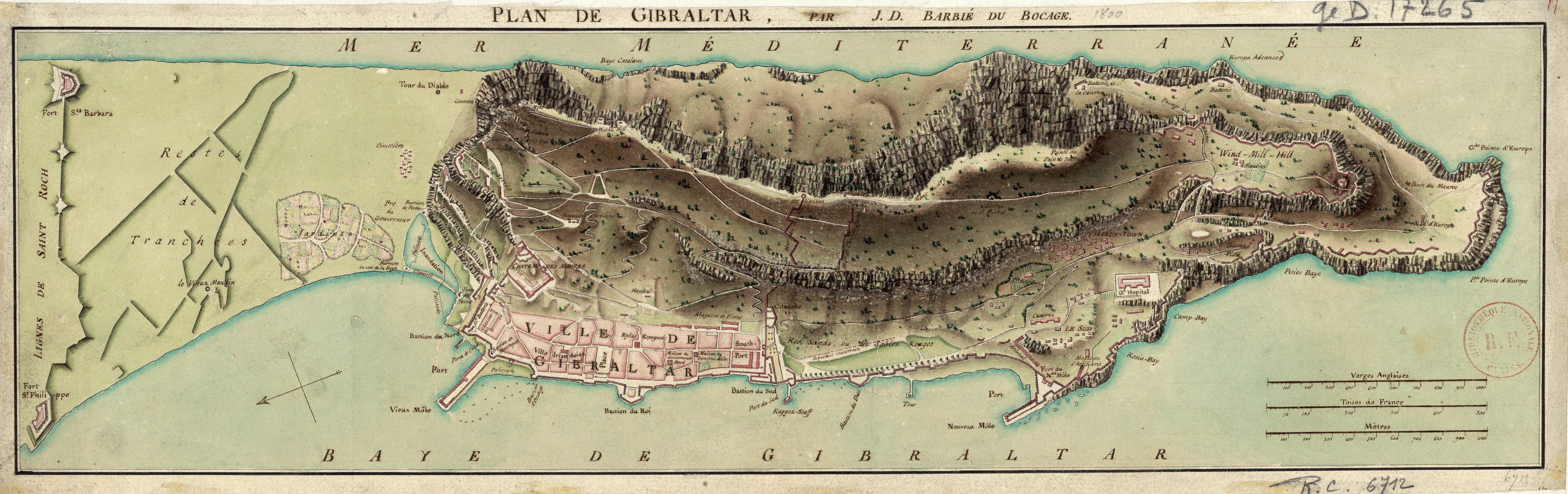 Plan de Gibraltar